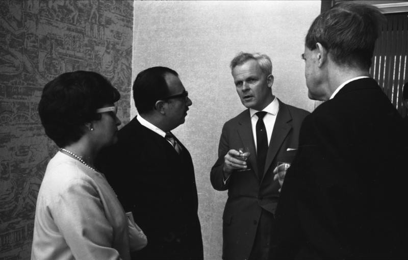 BM Bucher empfängt brasilianische Gäste im Königshof (hier im Bild von links: Frau da Fonseca, Prof. Fernando Gay da Fonseca, Justizminister Bucher, Ministerialdirektor Römer)